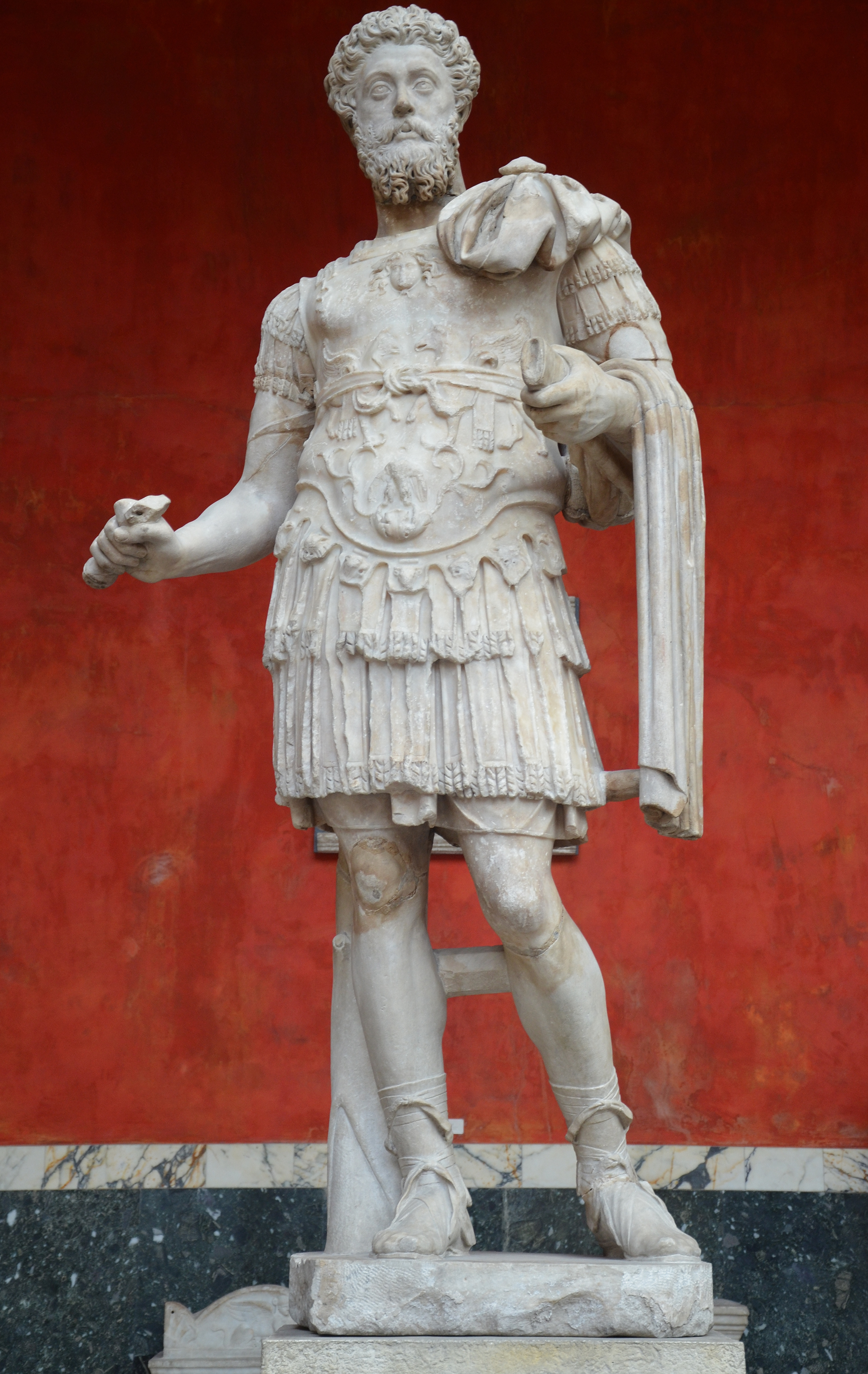 Marcus Aurelius, Ny Carlsberg Glyptotek, Copenhagen